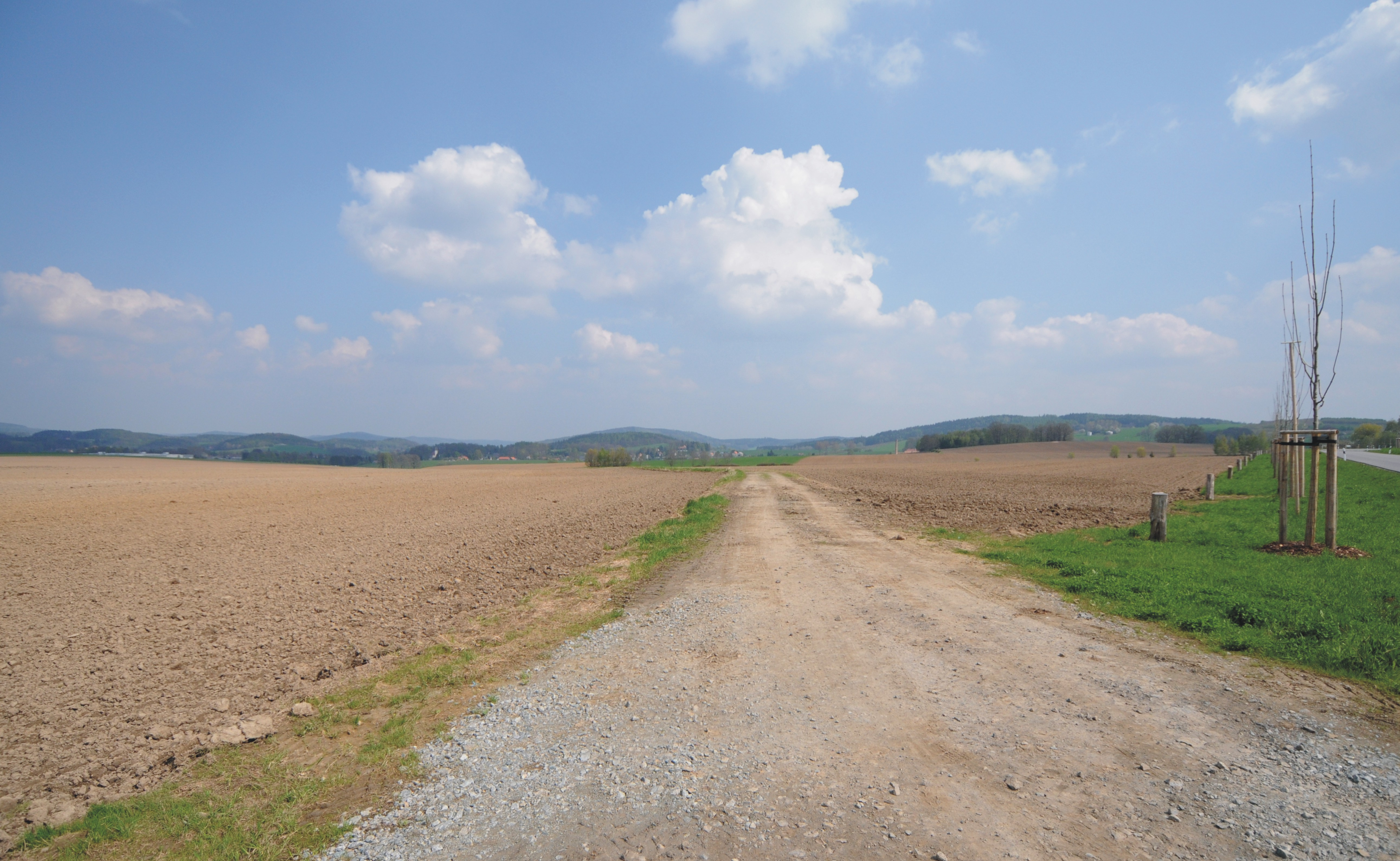 Lausitzer Bergland, Blick nach Sohland in Richtung Südost / Spree (Sachsen, Deutschland)